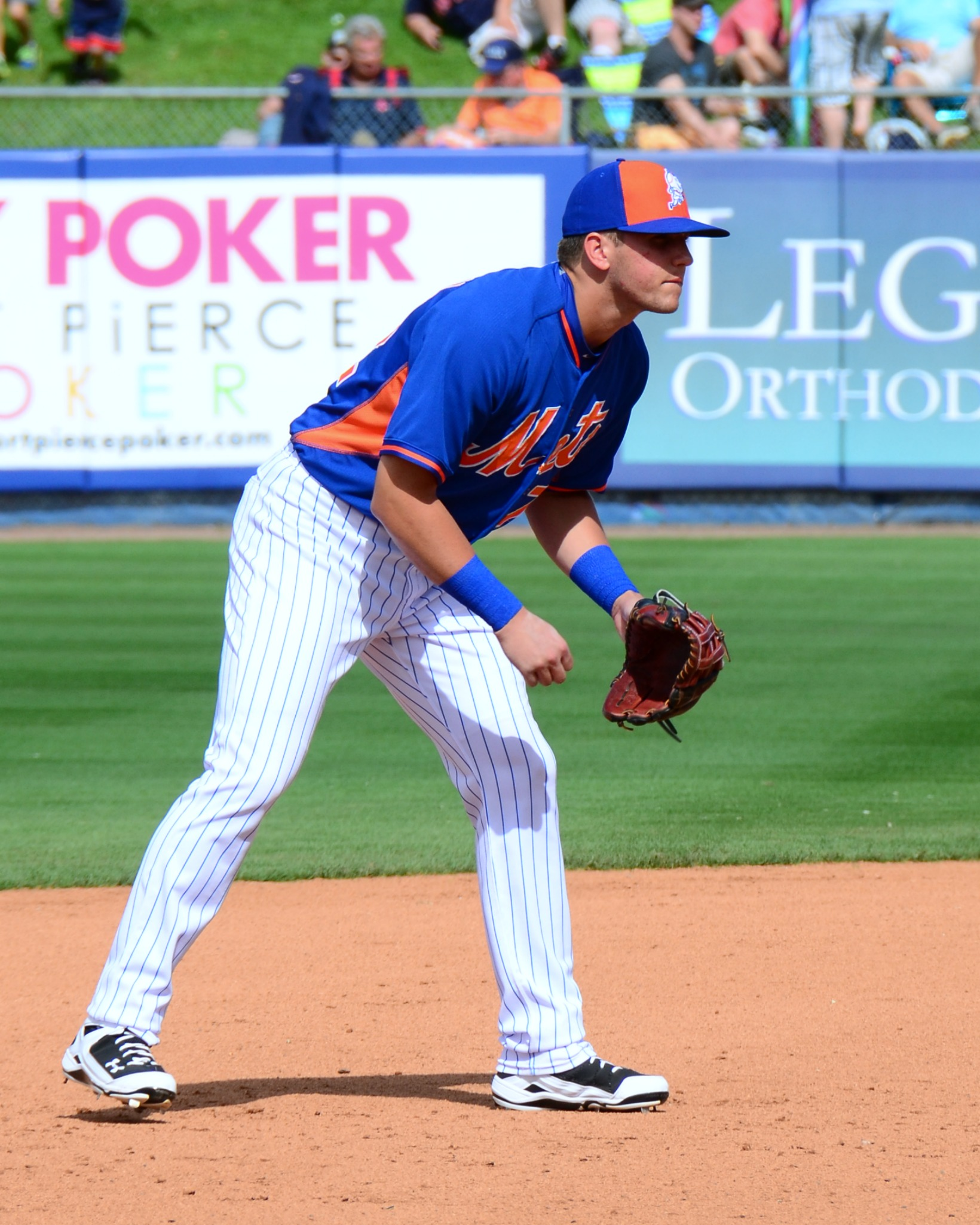 Gavin Cecchini